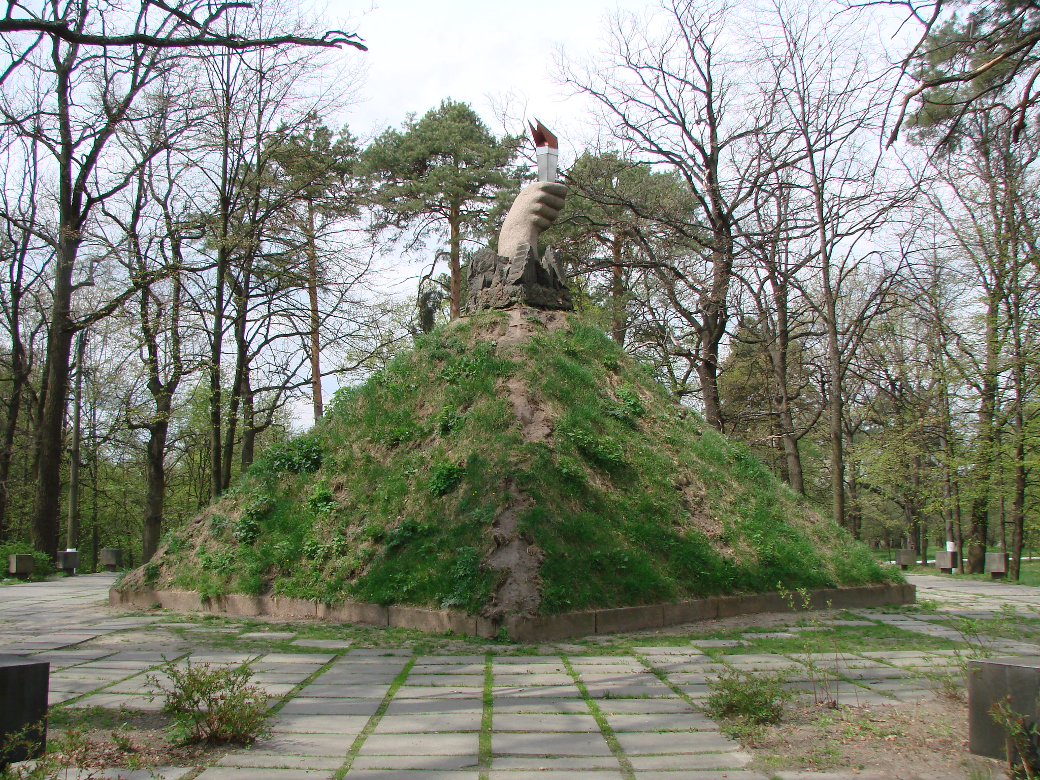 Курган безсмертя., Малин, у парку культури